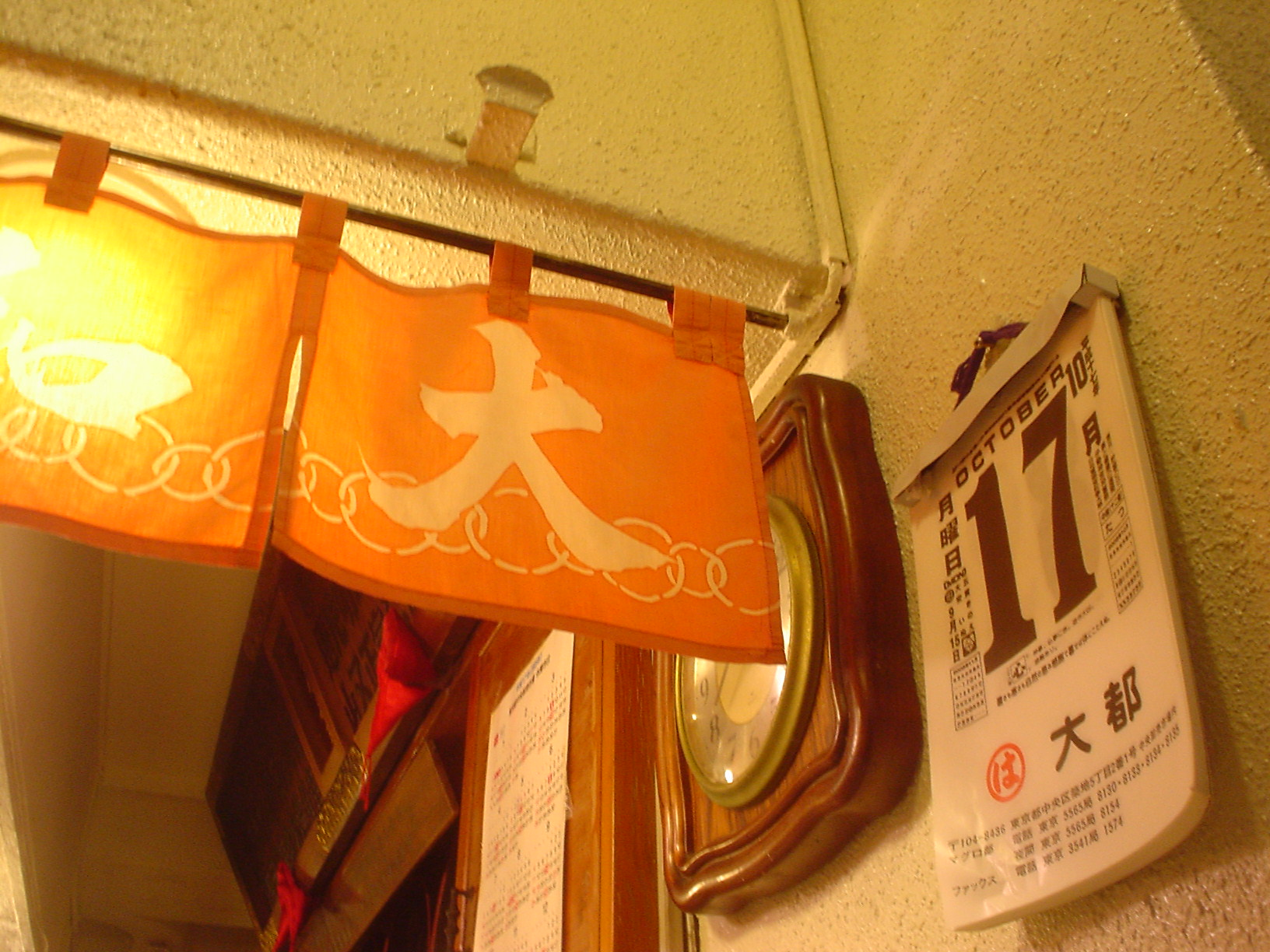 魚がし 大和鮨 [1] [2]